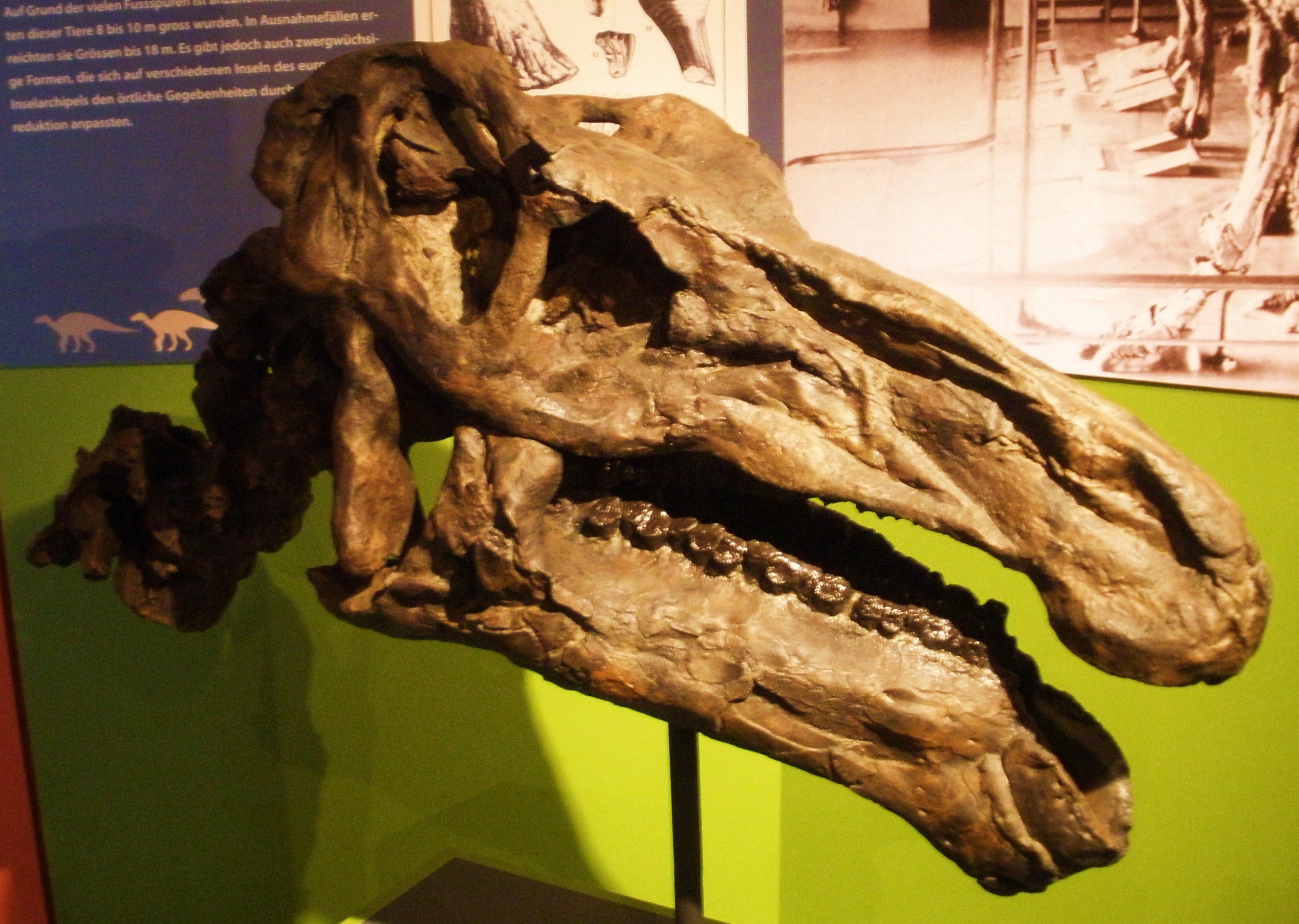 fossil of Iguanodon